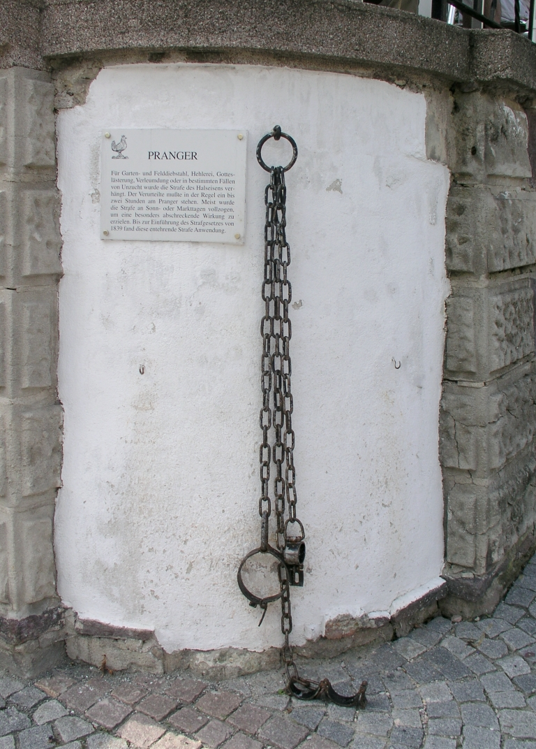 Das Bild zeigt den Pranger auf dem Ilmenauer Marktplatz